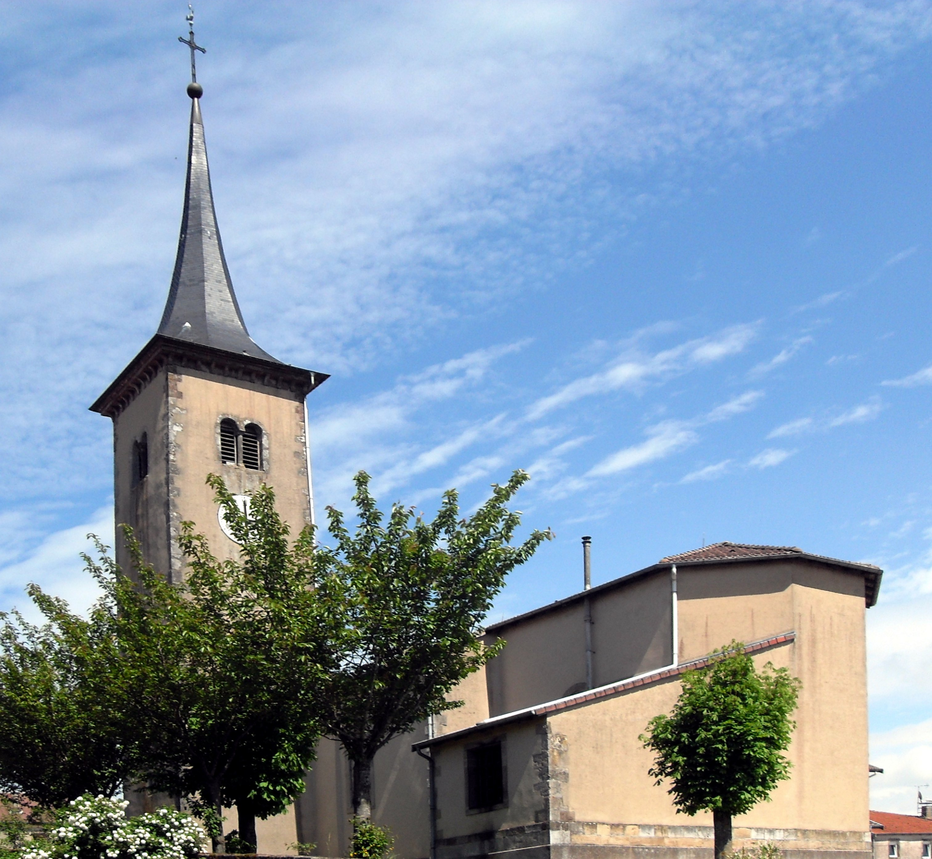 L'église Saint-Èvre d'Haillainville